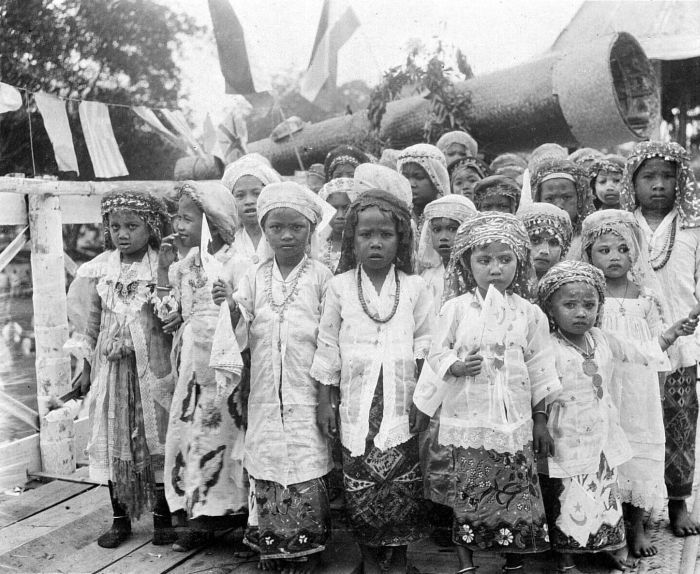 Repronegatief. Een groep Arabische kinderen in gelegenheidskleding te Kandangan